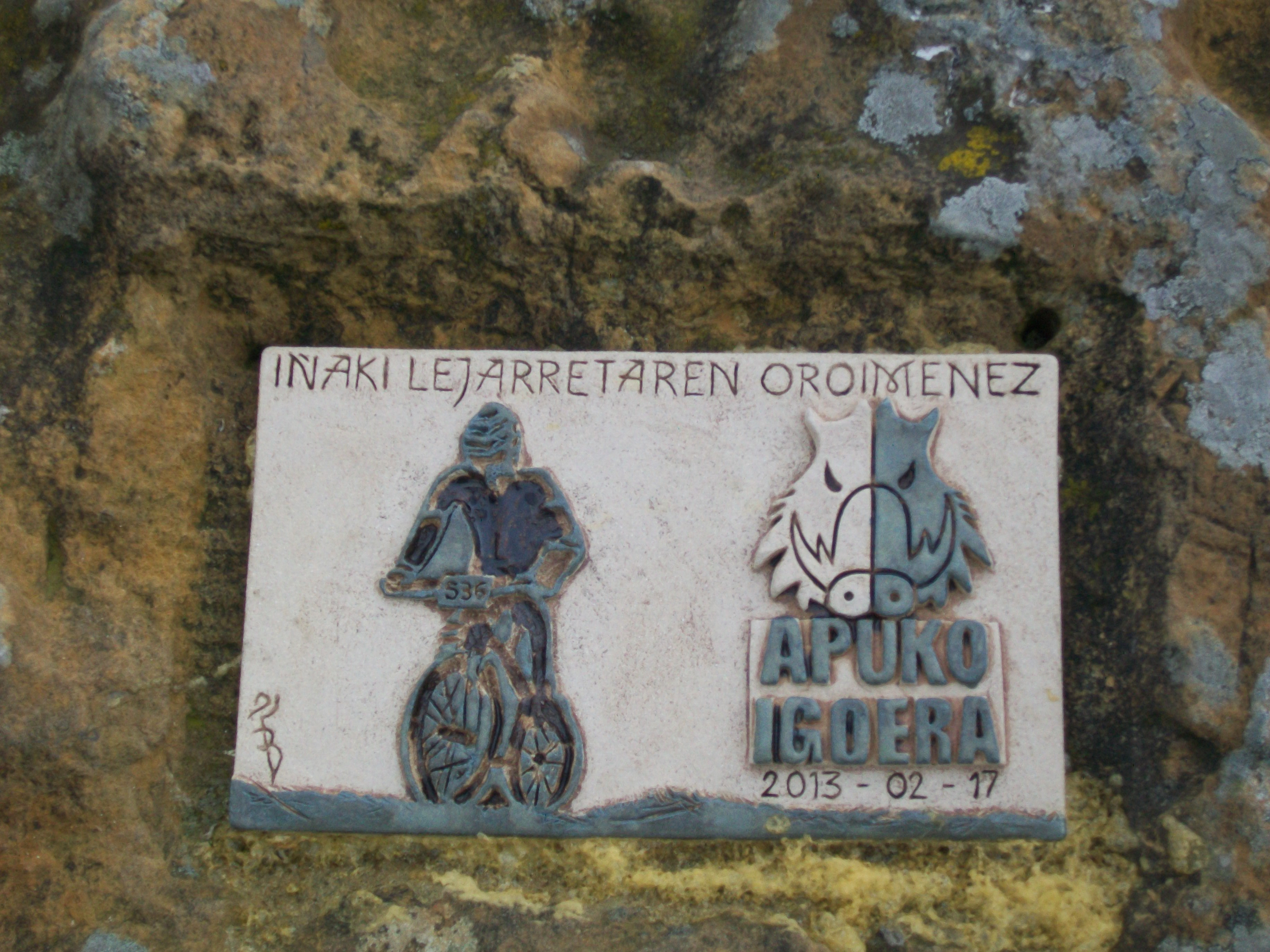 Placa Homenaje a Iñaki Lejarreta en Apuko